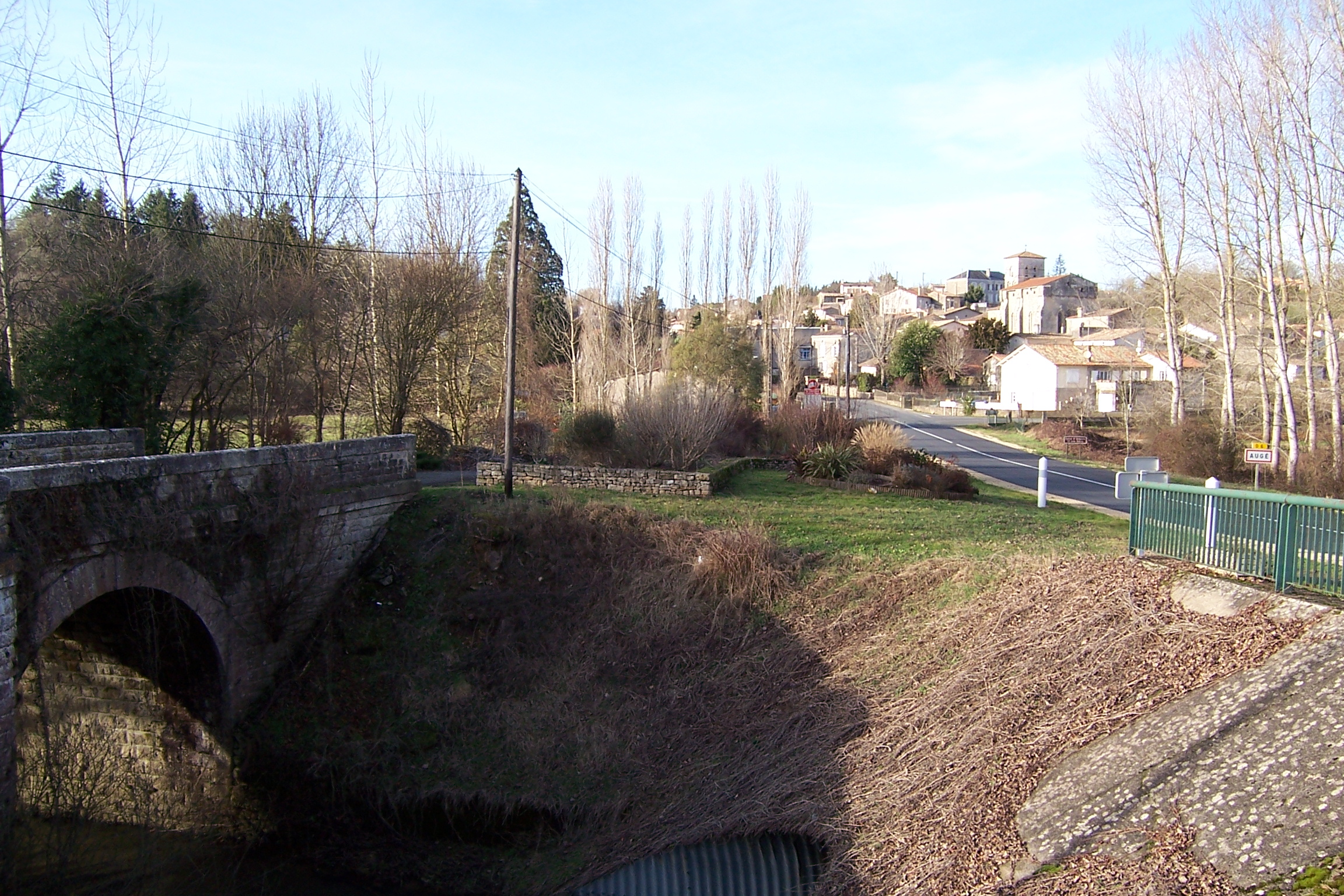 Vue du bourg d'Augé depuis la rivière